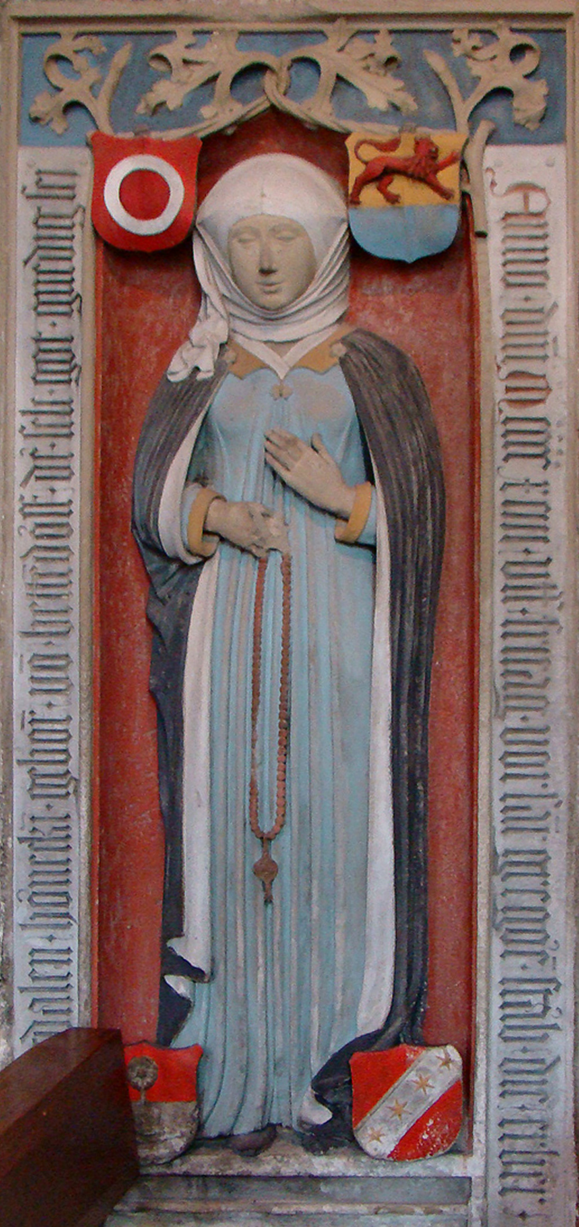 Historische Grabplatte in der Notburgakirche in Haßmersheim-Hochhausen; zur Bestimmung der Wappen siehe Diskussion im Forum Heraldik und Kunst